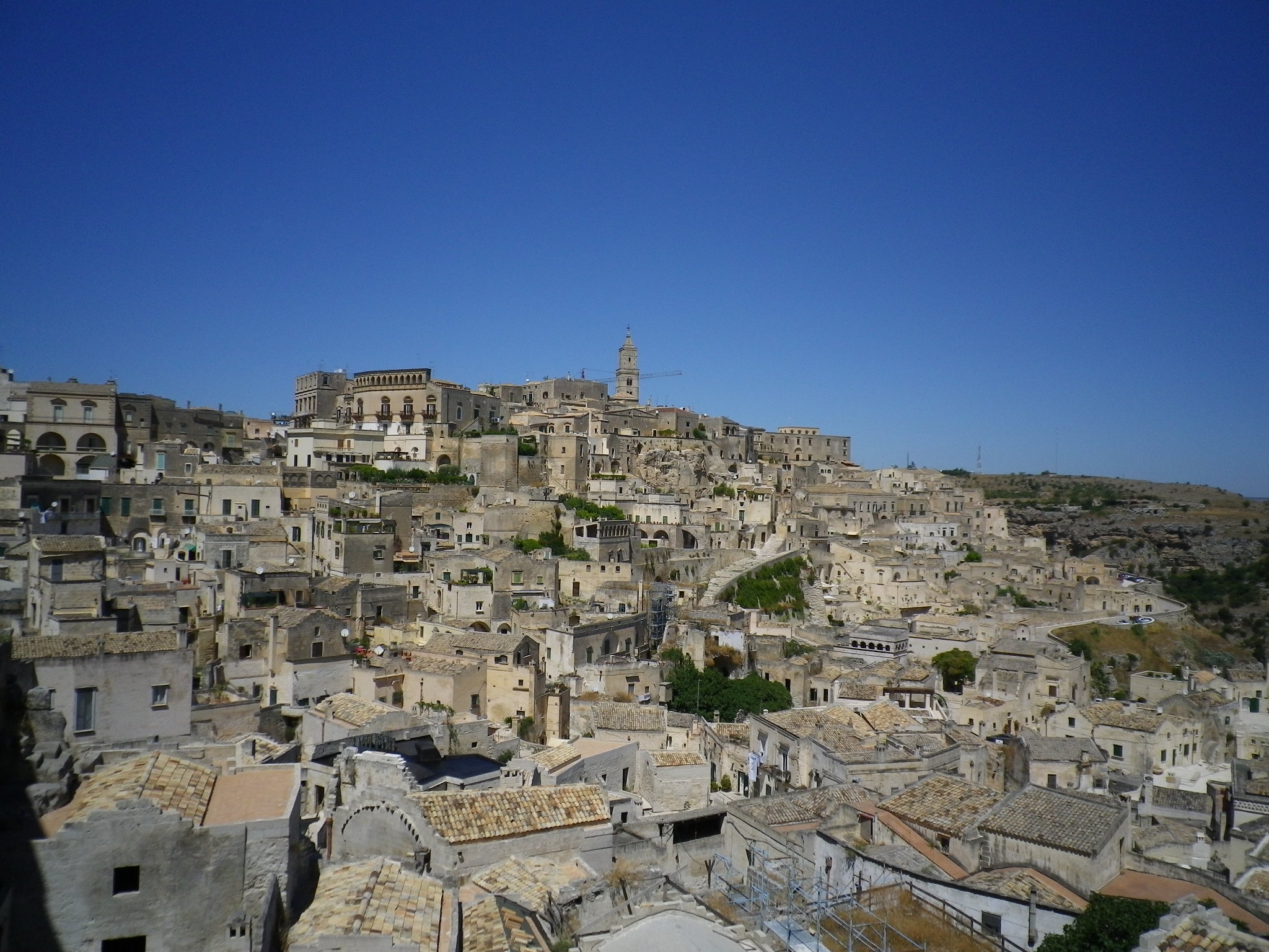 La ciutat de Matera, dins Polha